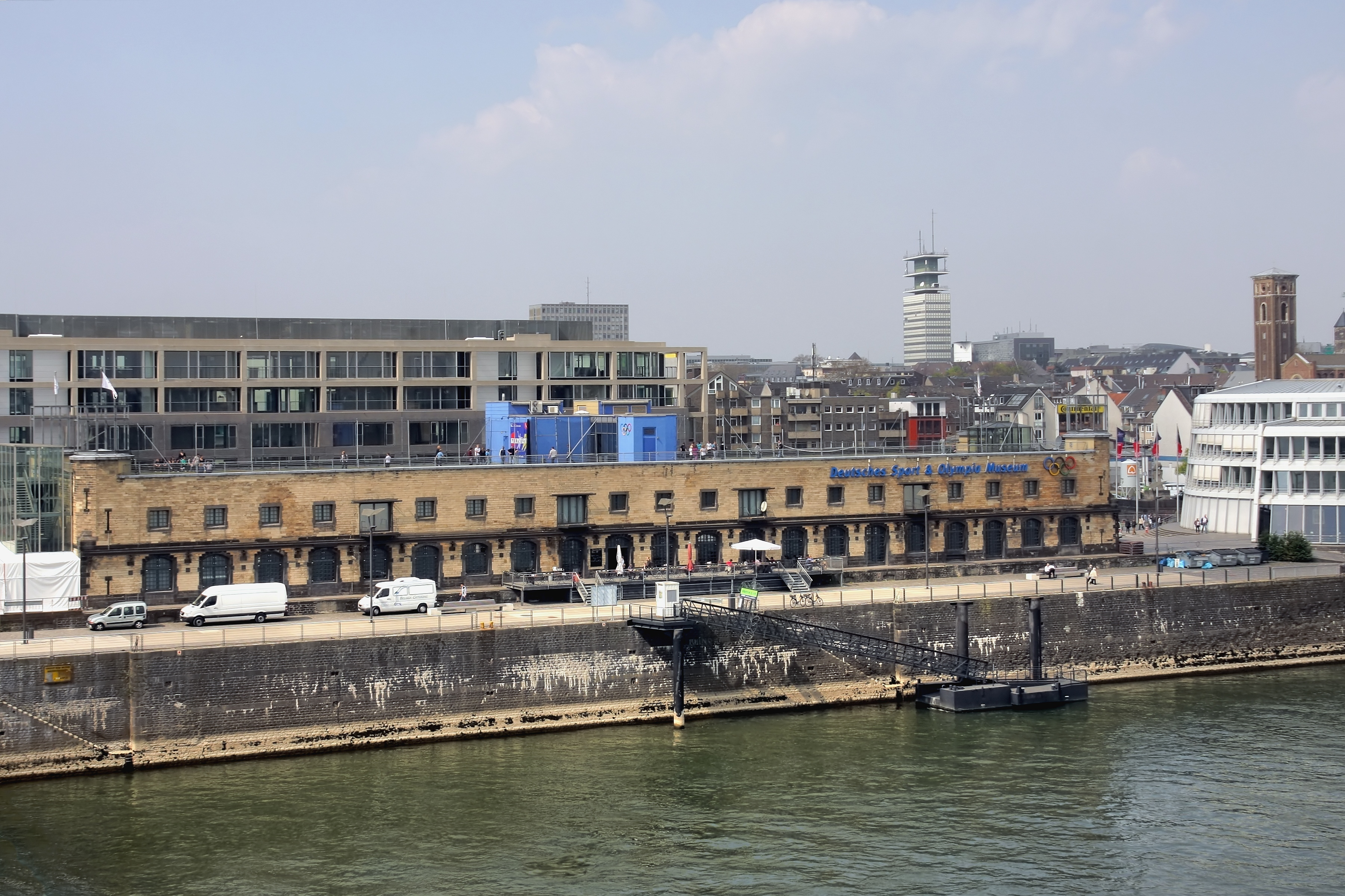 Rheinauhafen Köln - Deutsches Sport- und Olympiamuseum - Rheinseite